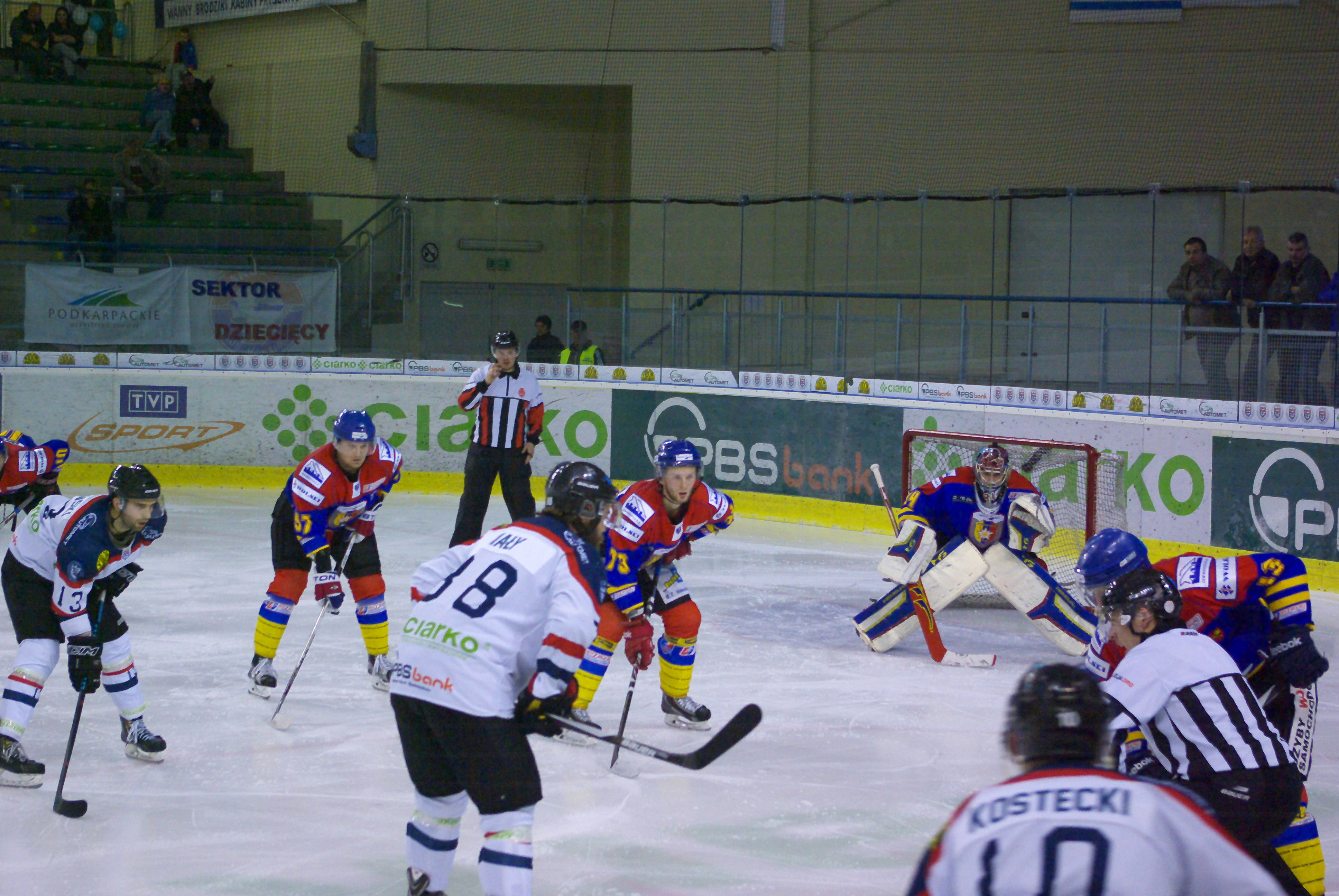 Mecz STS Sanok - Podhale Nowy Targ 1:4 (Arena Sanok, 23 października 2015).